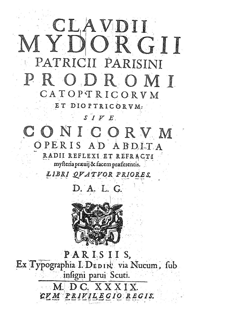 Frontespizio